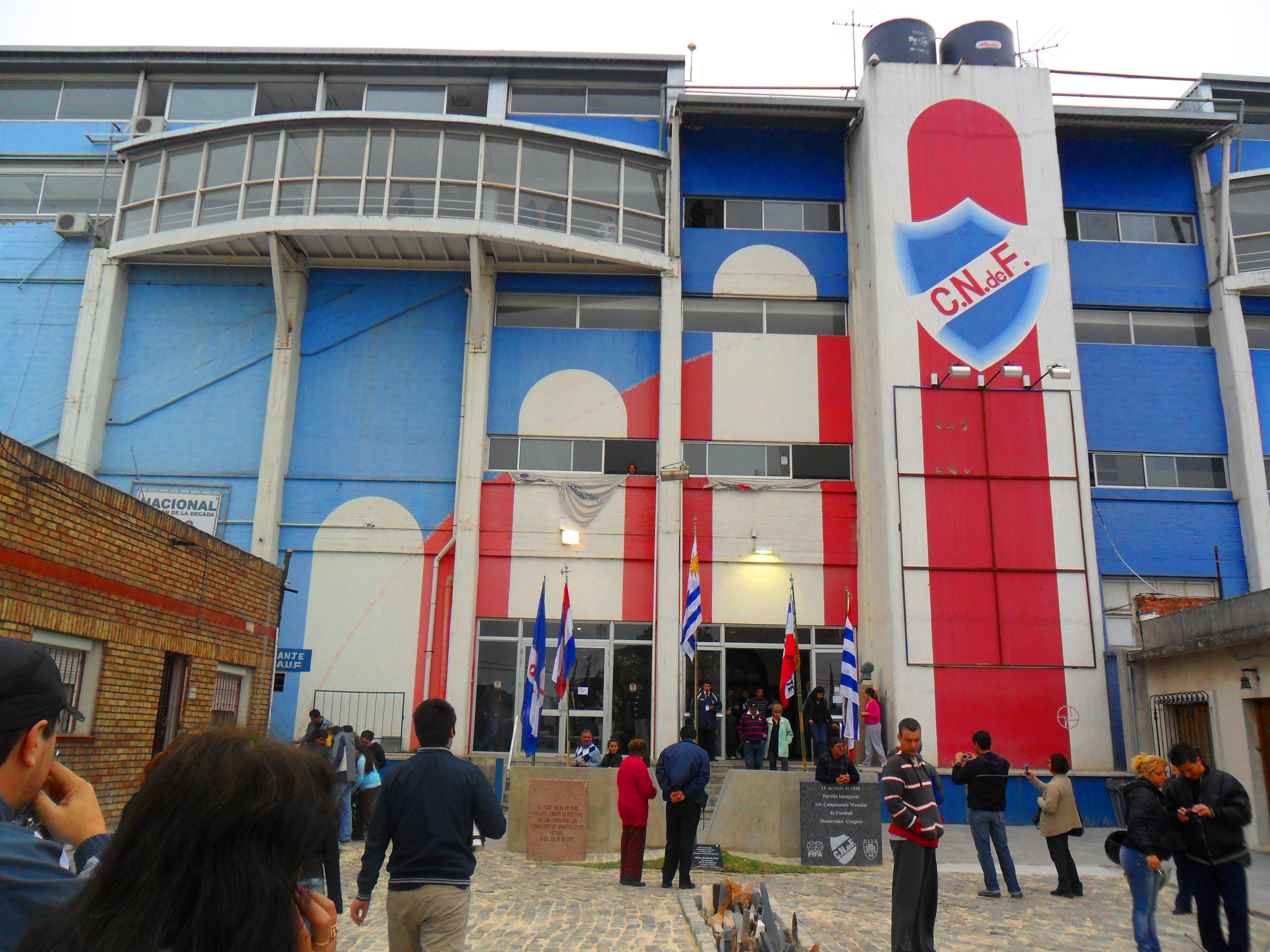 Fachada del estadio Gran Parque Central, correspondiente al acceso a la tribuna José María Delgado. Foto tomada durante el Día del Patrimonio del año 2011